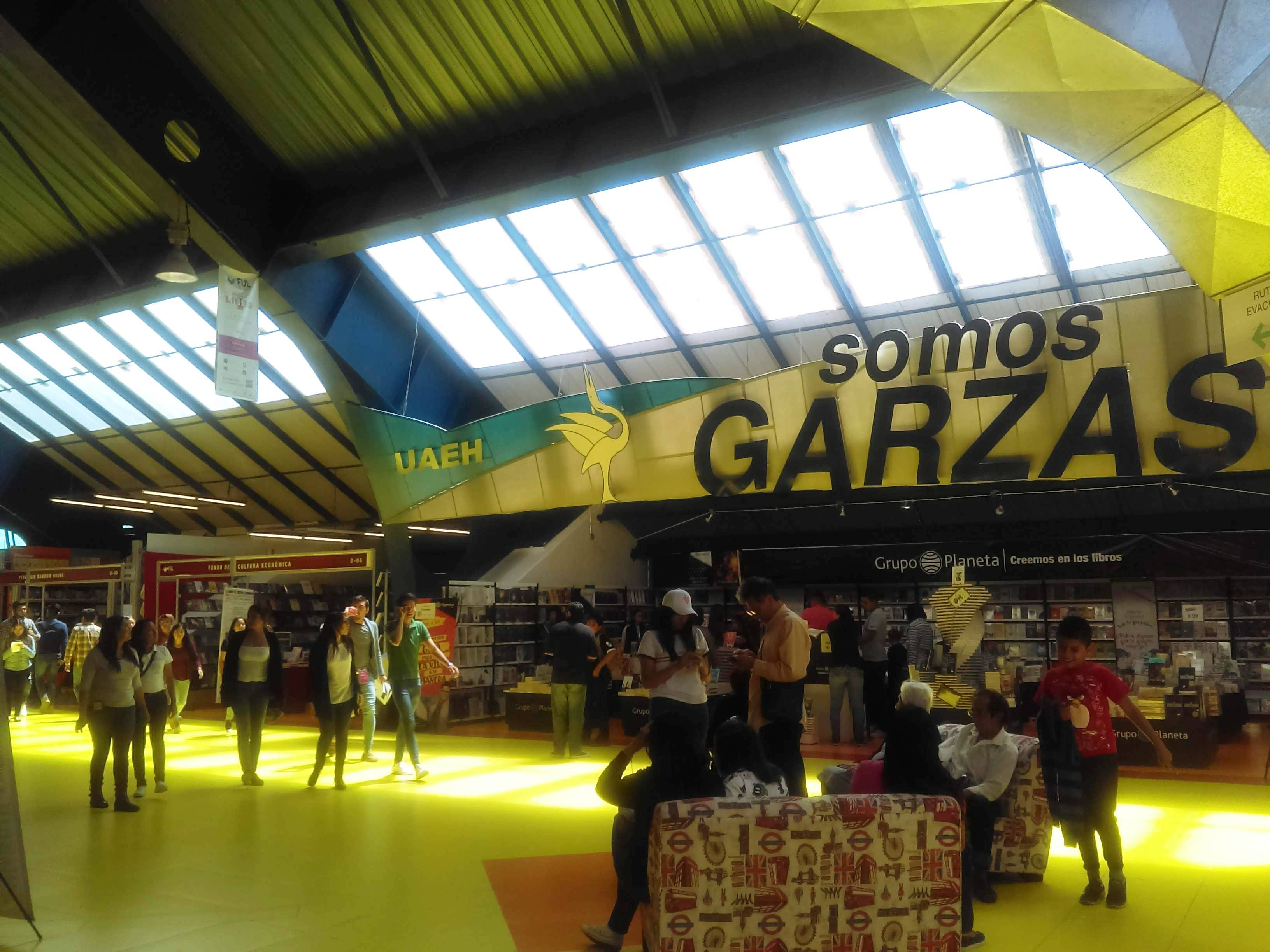 Feria Universitaria del Libro de la UAEH (2018).